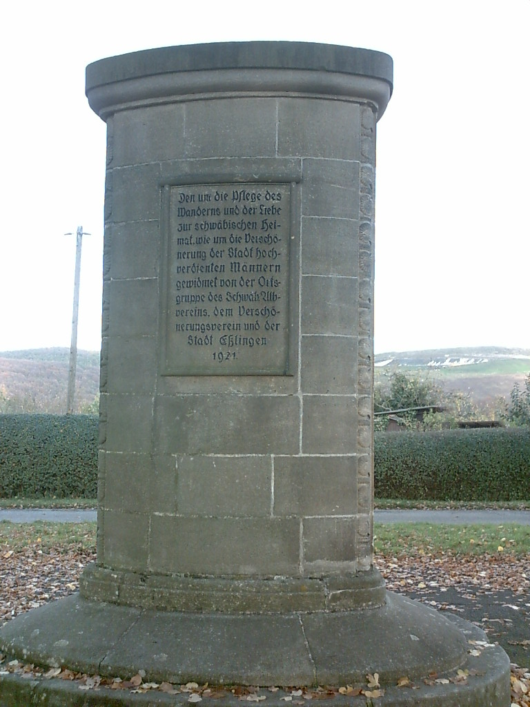 Denkmal für Valentin Salzmann und Ernst Camerer in Esslingen, selbst fotografiert, 2005